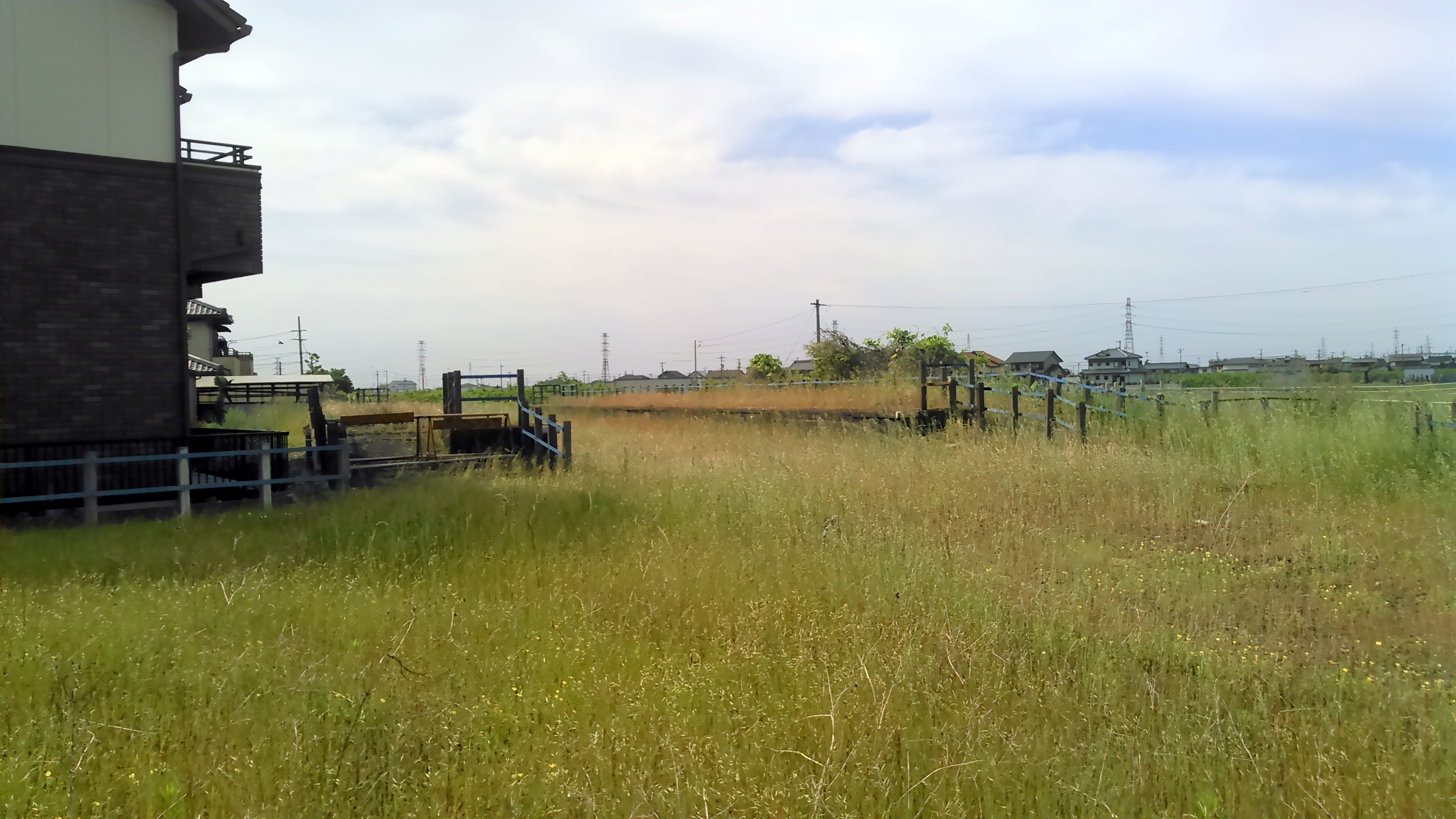 真正郵便局前にあり、隣接県道から離れているために遠くに感じる。 また、ホームの隣接は私有地であるために撮影のアップロードには不適であった。